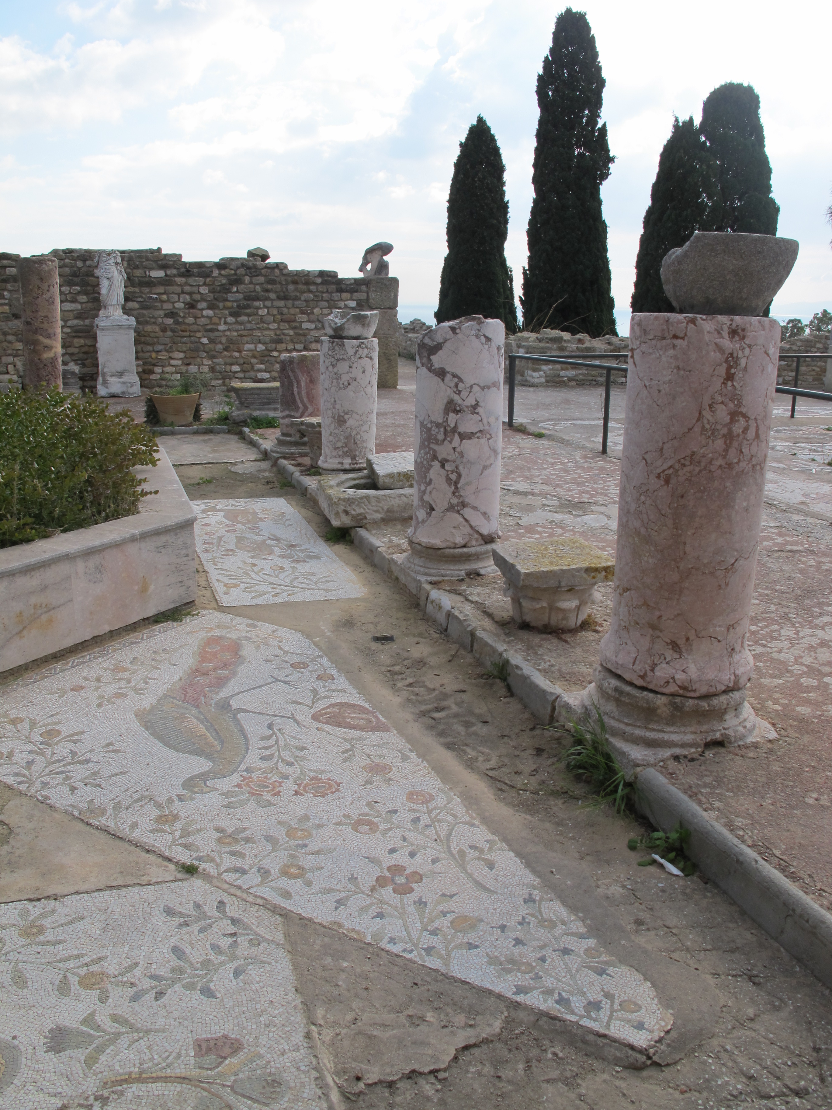 Mosaikausschnitt, Roman Villas in Karthago